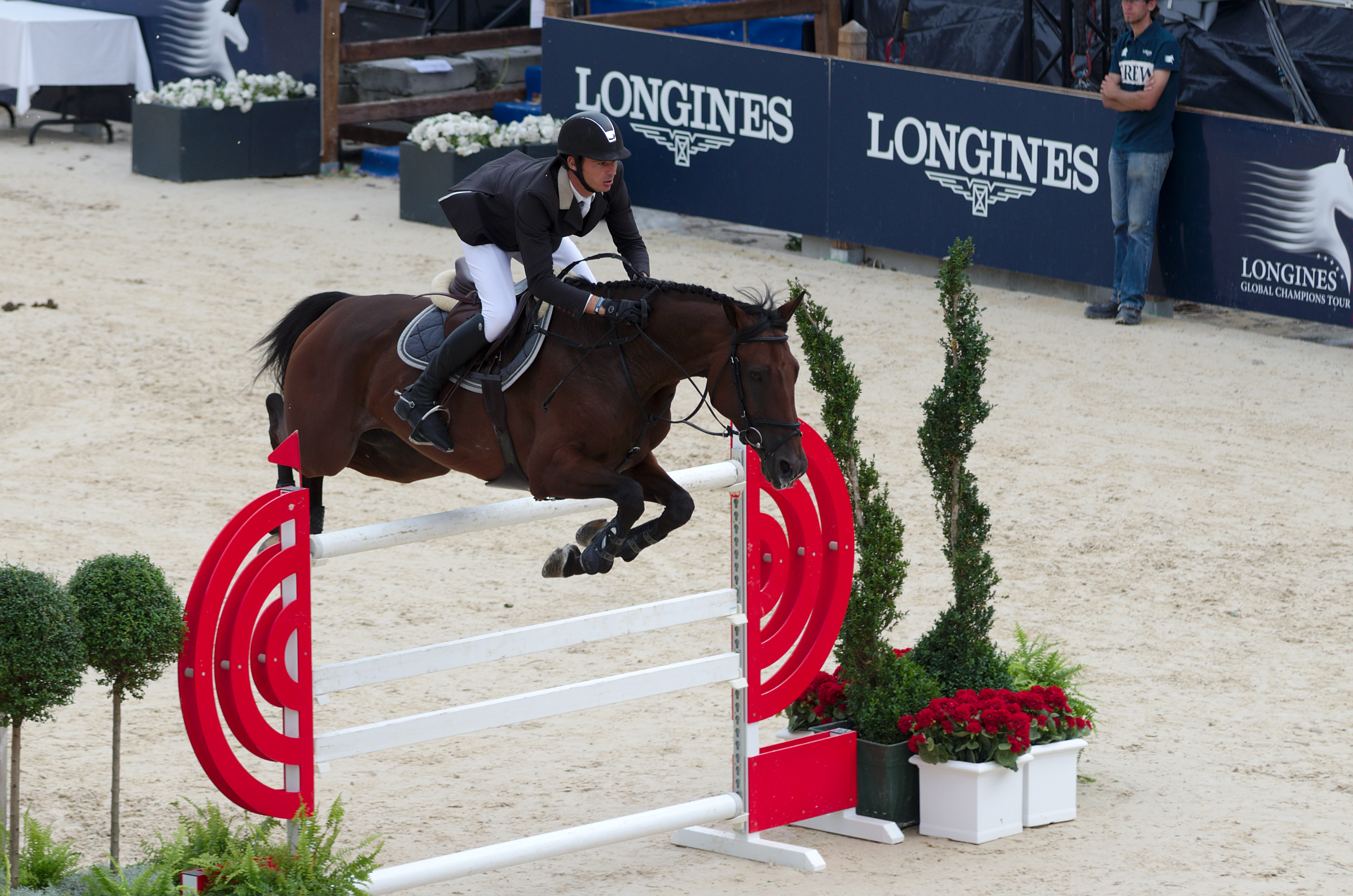 2013 Longines Global Champions - Lausanne - 14-09-2013 - Steve Guerdat et Sidney VIII